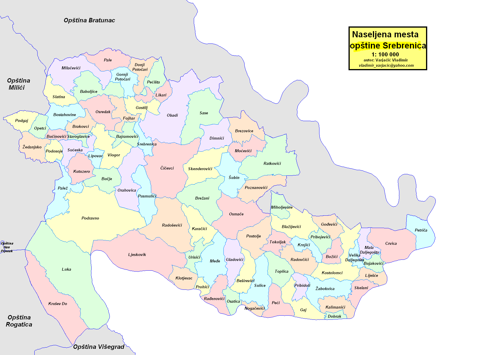 Opština Srebrenica